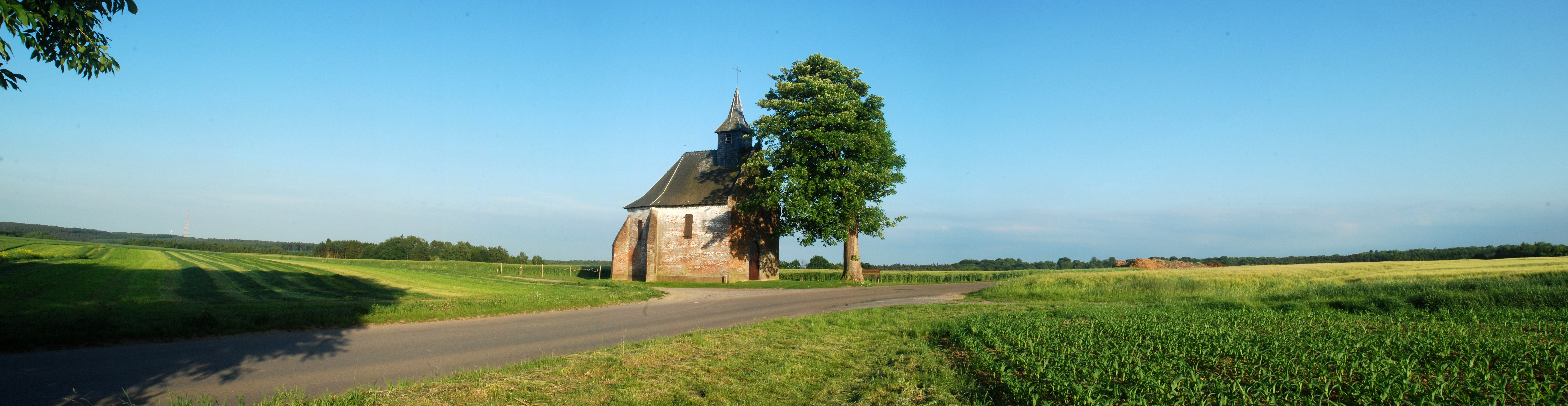 Belgique - Bousval - Chapelle du Try-au-Chêne